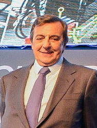 El presidente Mauricio Macri encabezó el acto de reinauguración de la planta de producción El Palomar de PSA Peugeot.